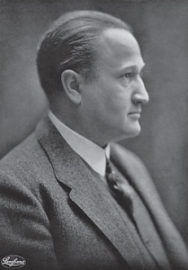 Karel Loevenstein (1885-1938), fotografie ateliéru Langhans.